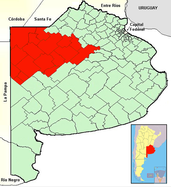 Mappa della Diocesi cattolica di Nueve de Julio, nella provincia di Buenos Aires (Argentina)